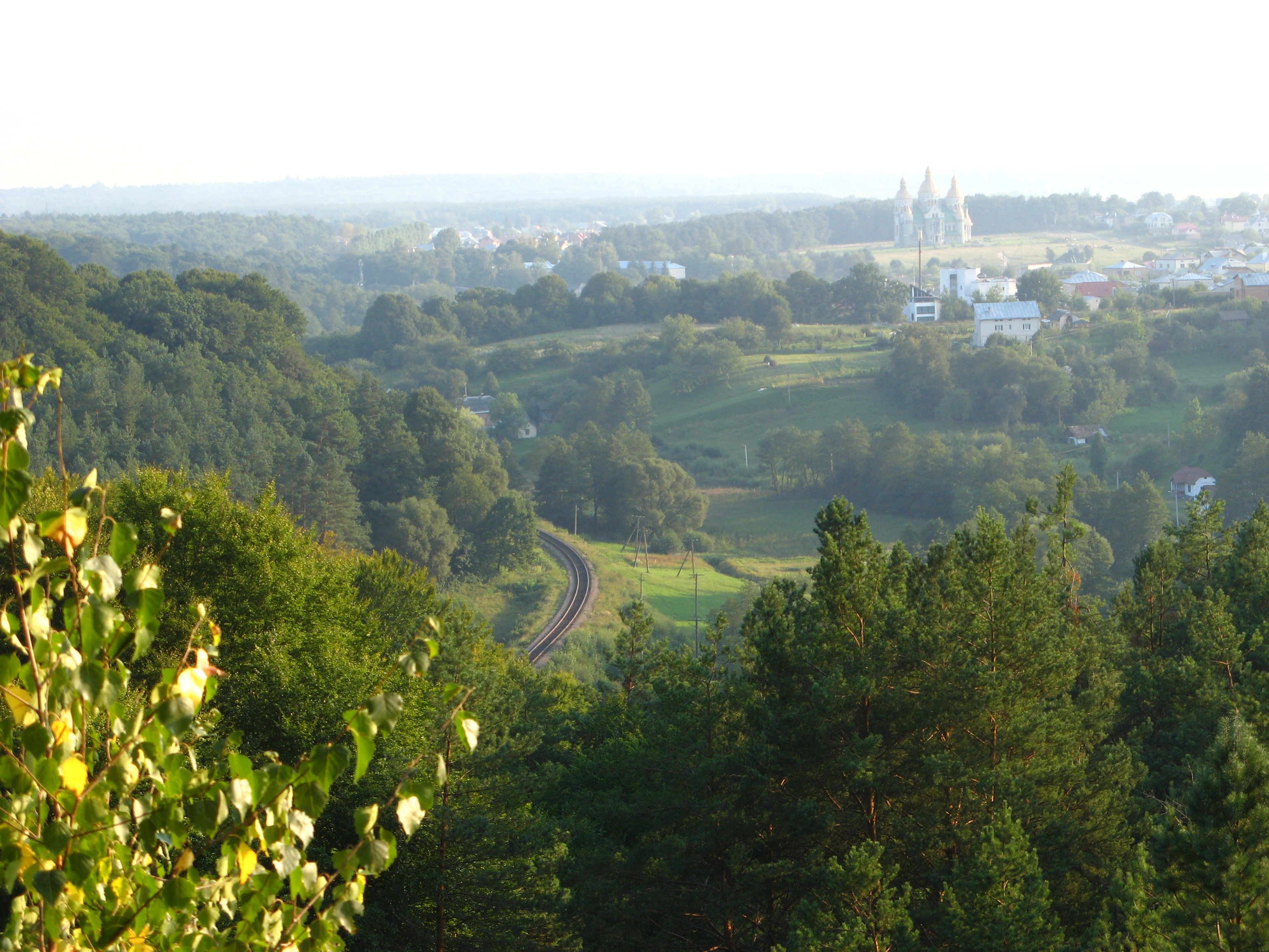 c. Бірки (Яворівський р-н)